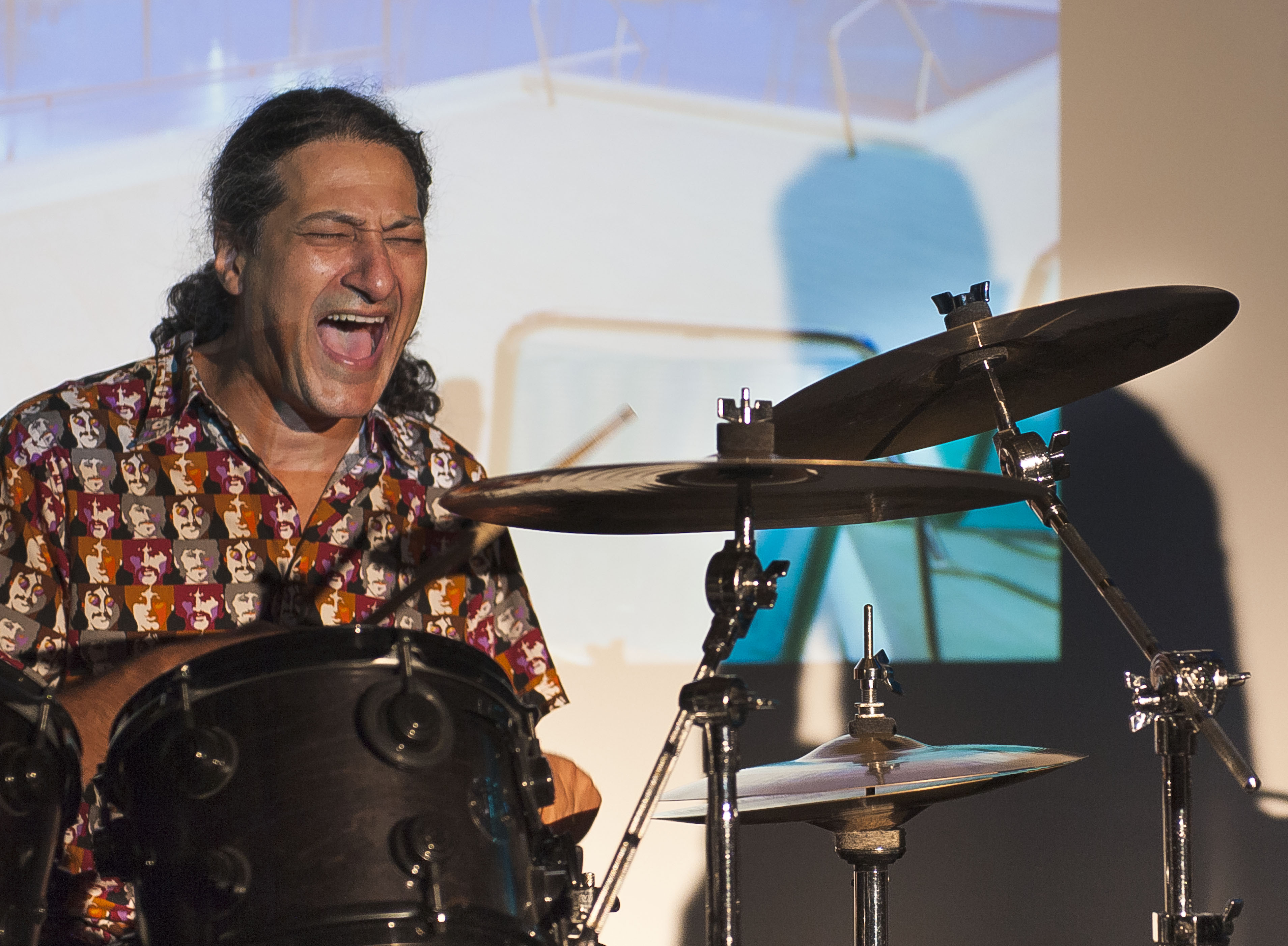 Daniel Messina (Konzert von Schmid - Langer - Messina in der Galerie Sonnenberg, Stuttgart, 10.9.16)